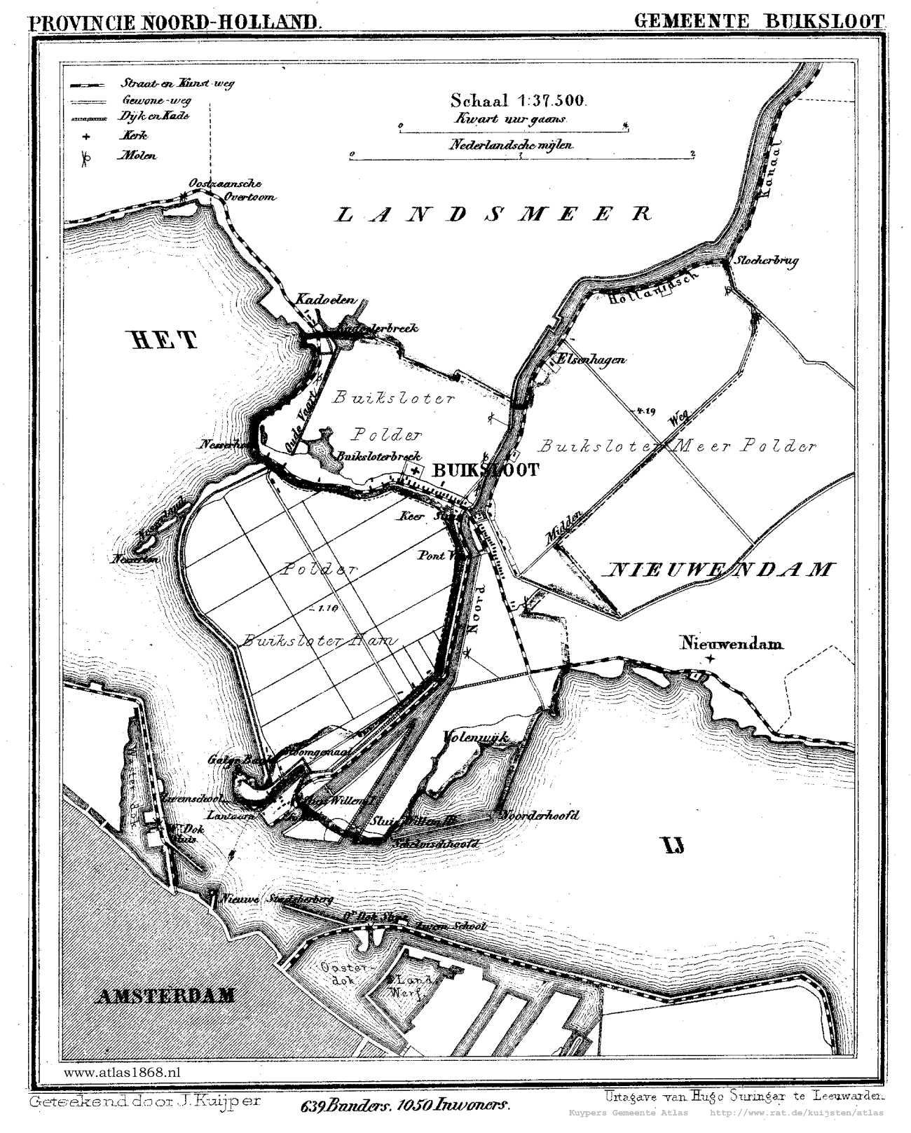 Kaart van Buiksloot uit Gemeente Atlas van Nederland, J. Kuyper 1865-1870, Uitgave Hugo Suringar Leeuwarden.